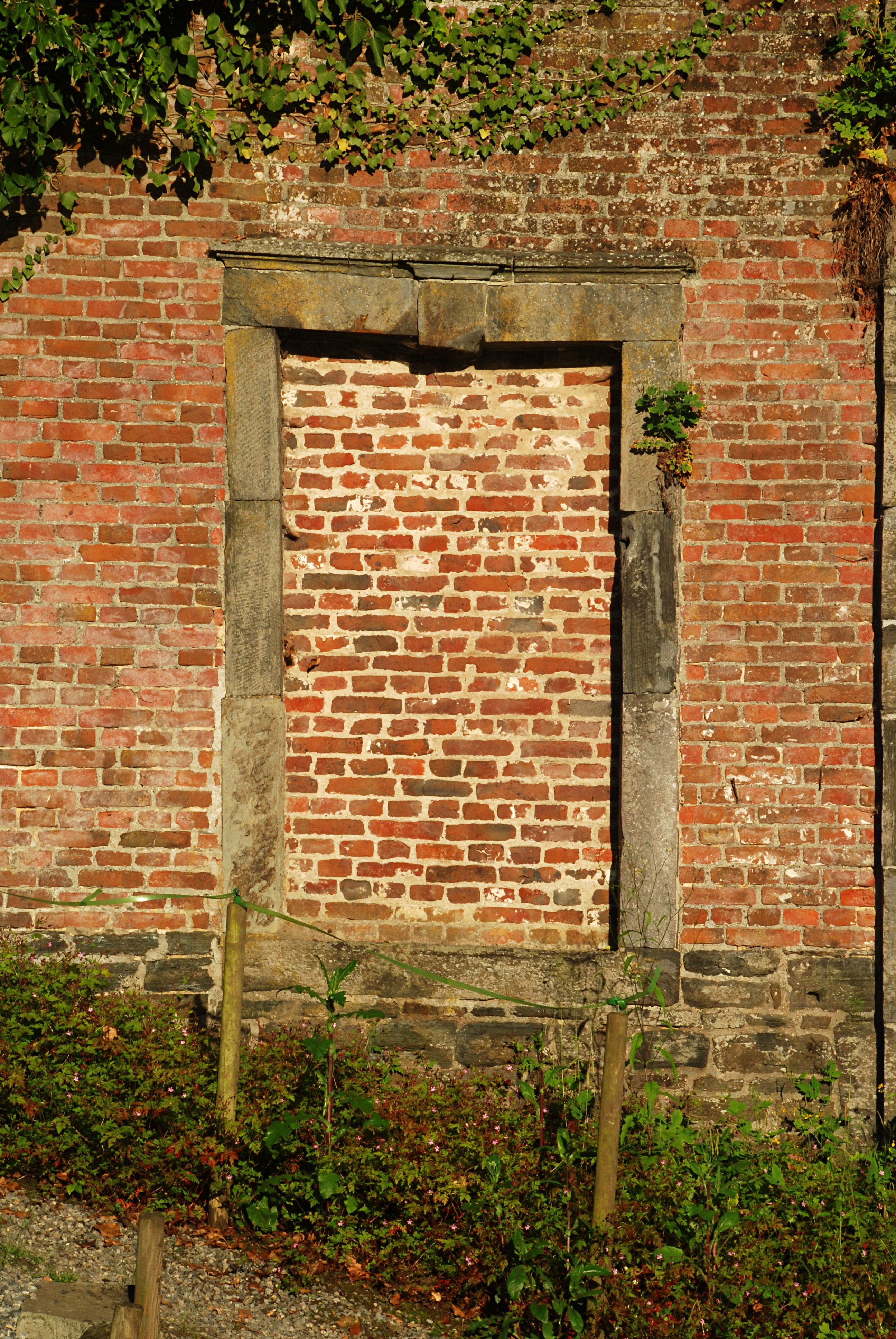 Belgique - Brabant wallon - Villers-la-Ville - Porte de Namur